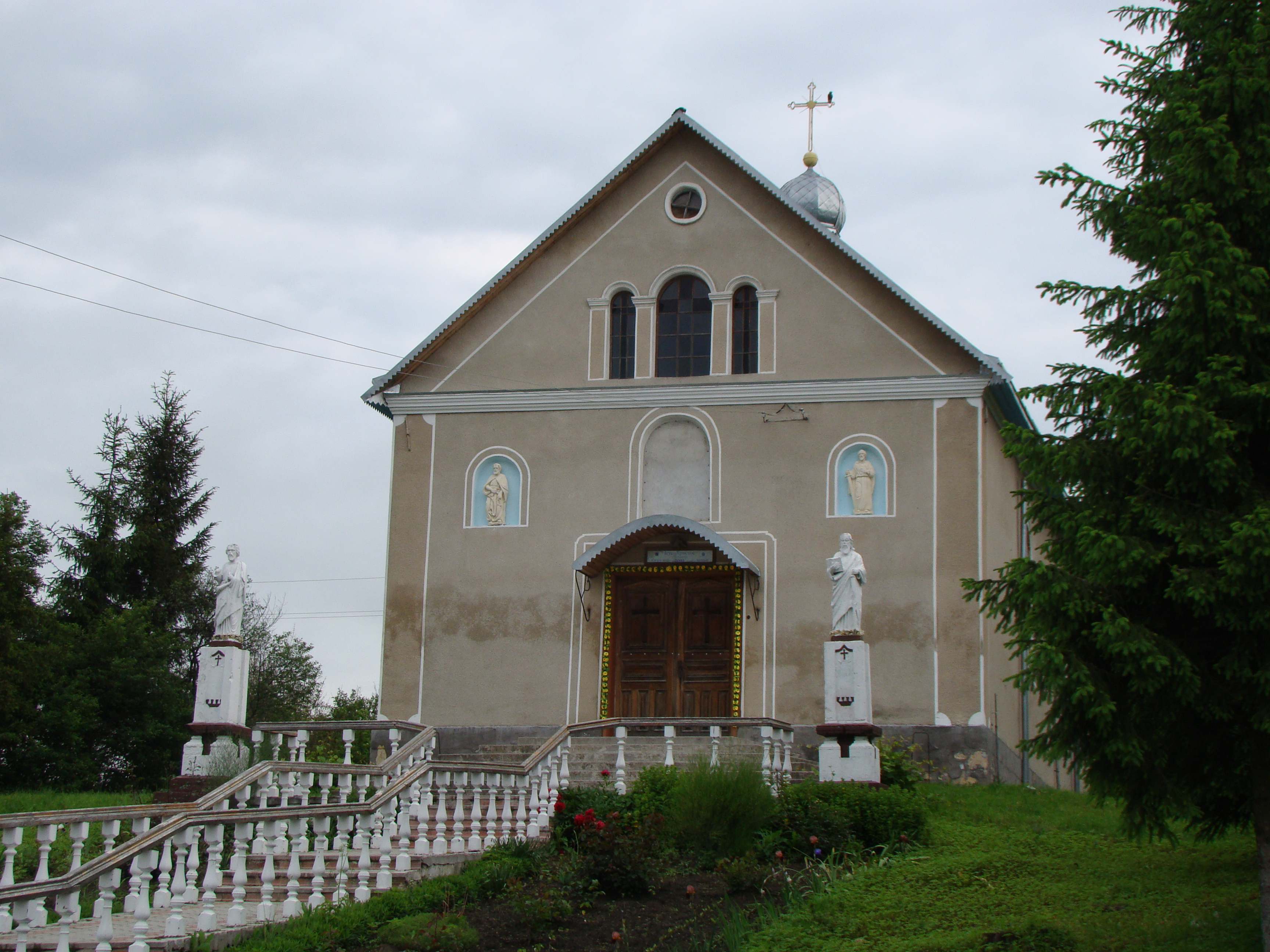 Białokrynica - dawny kościół rzymskokatolicki pw. Św. Piotra i Pawła, obecnie cerkiew